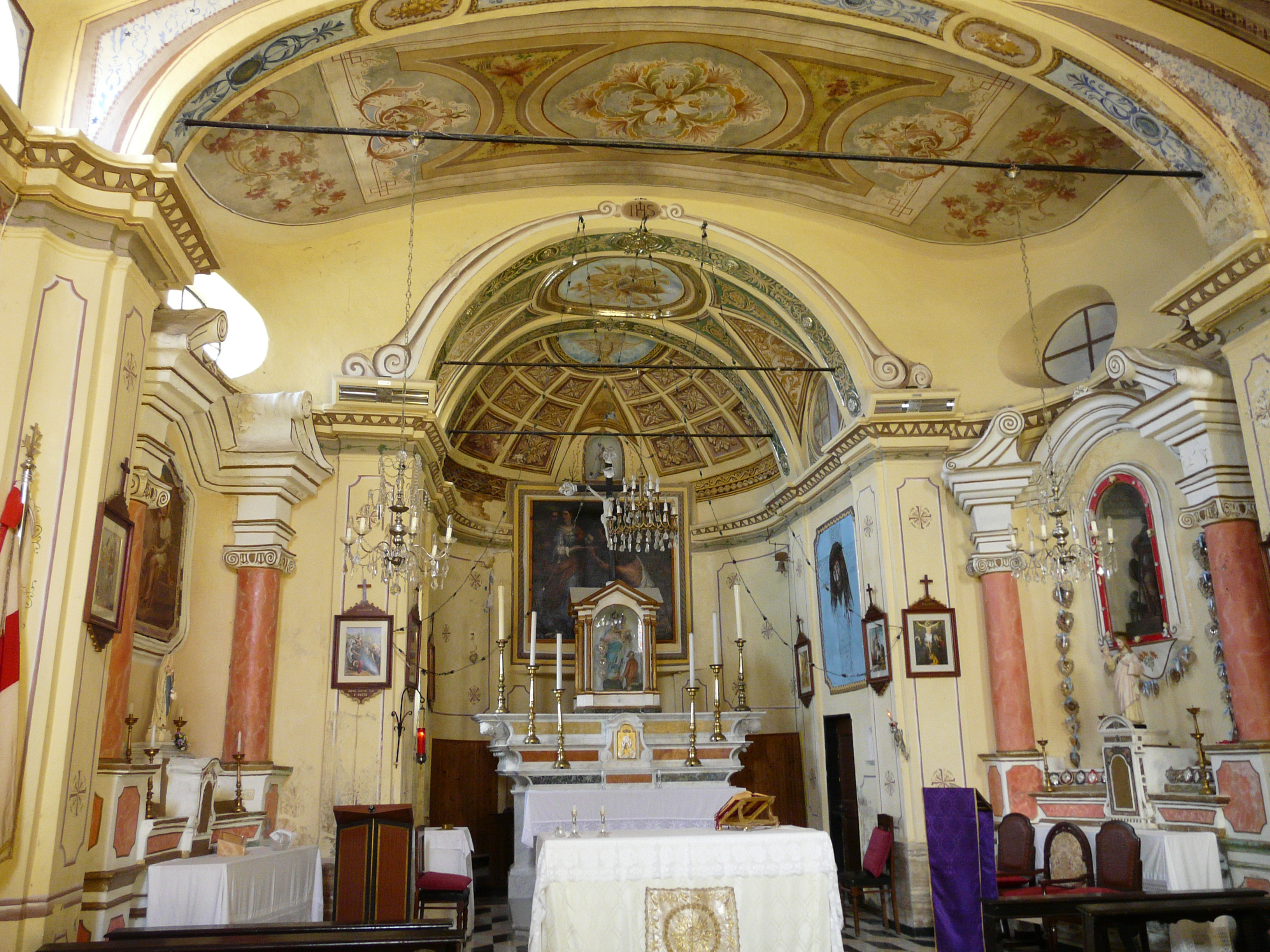 Chiesa di San Giovanni Battista, Terrusso, Bargagli, Liguria, Italia